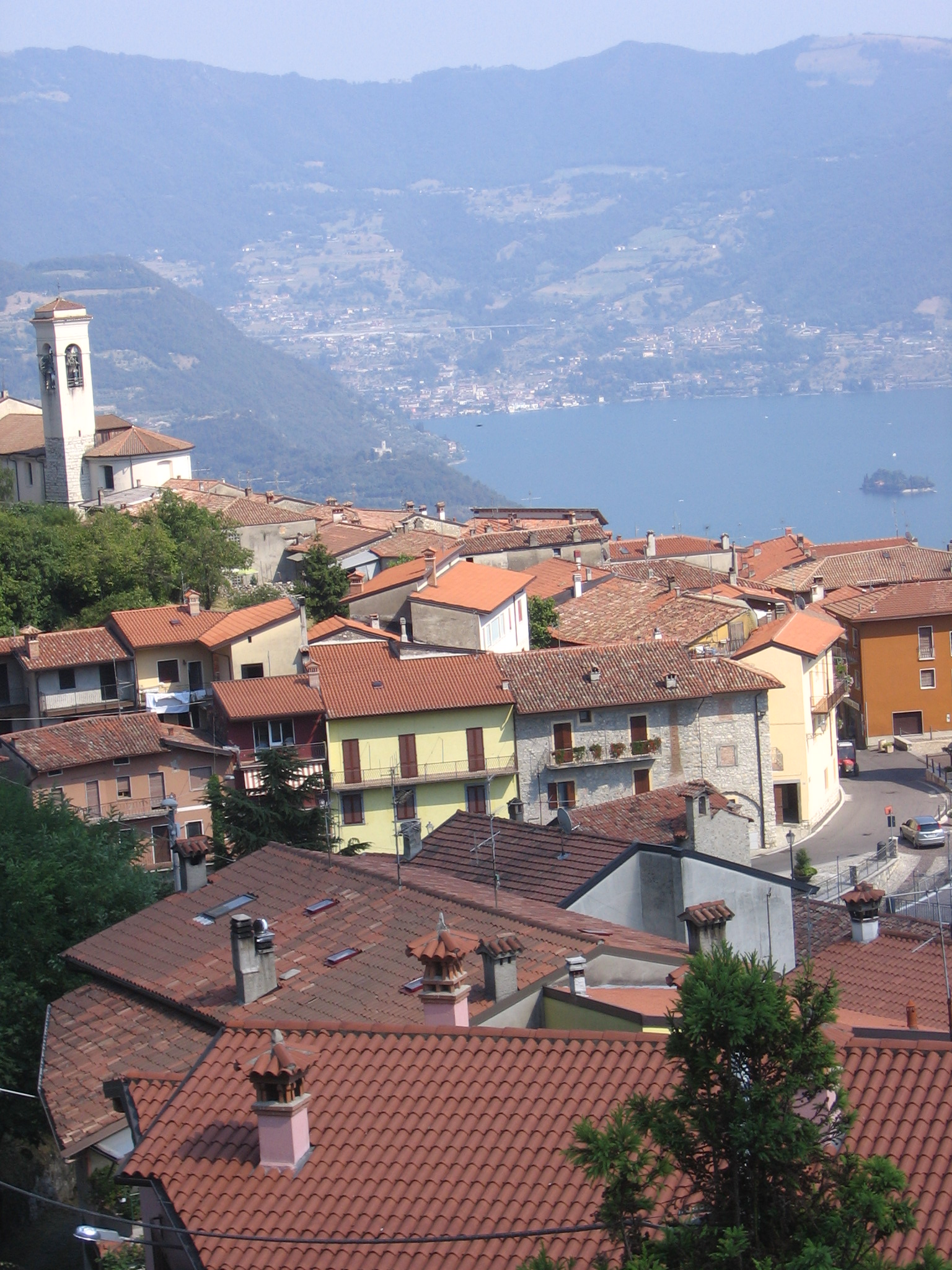 Vigolo, Bergamo, Italy